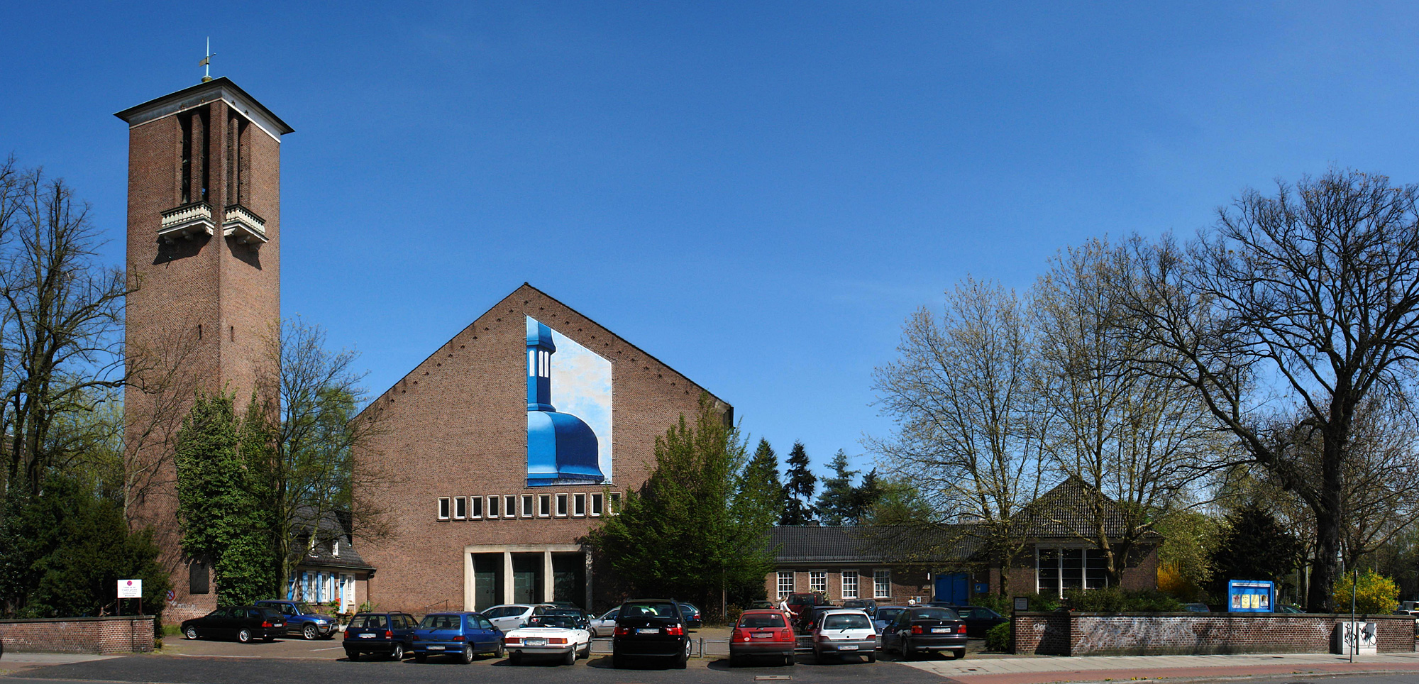 St.Ansgarii-Kirche in Bremen, Hollerallee / Schwachhauser Heerstr.